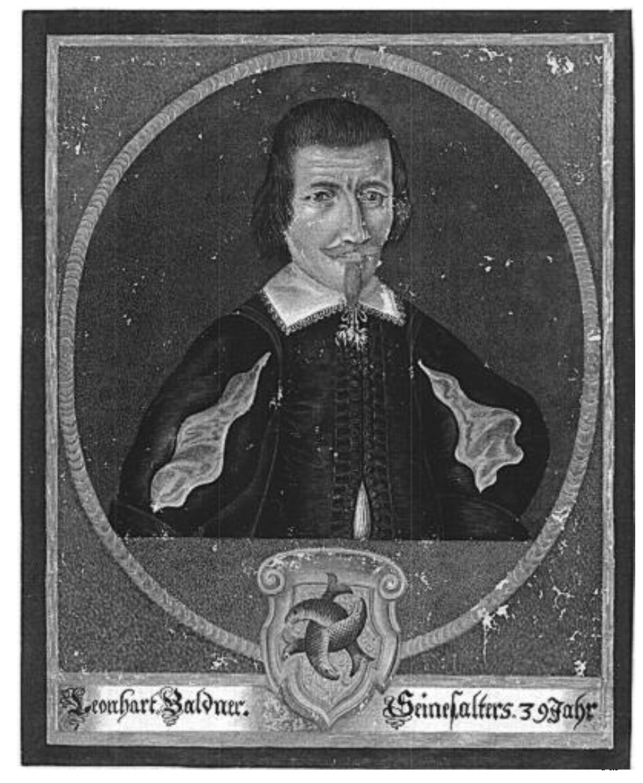 Leonhard Baldner (1612- 1694)